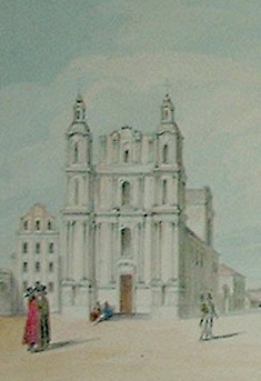 Беларуская (тарашкевіца): Віцебск (Viciebsk), Прачысьценская гара (Pračyścienskaja hara). Царква Прачыстай Багародзіцы і манастыр базылянаў